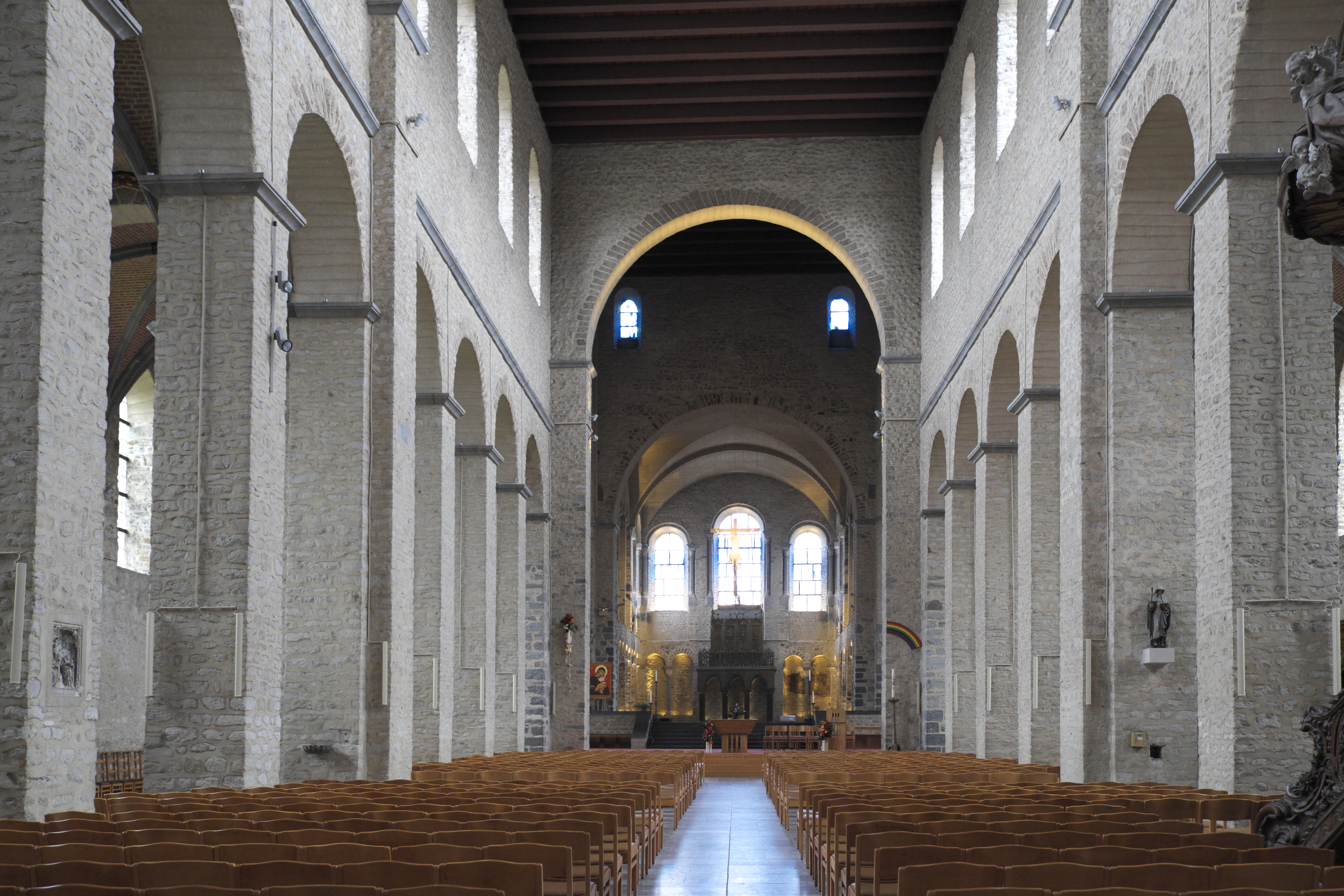 Pfarrkirche und ehemalige Stiftskirche St. Gertrud in Nivelles in der Provinz Wallonisch-Brabant (Wallonische Region/Belgien), Innenraum